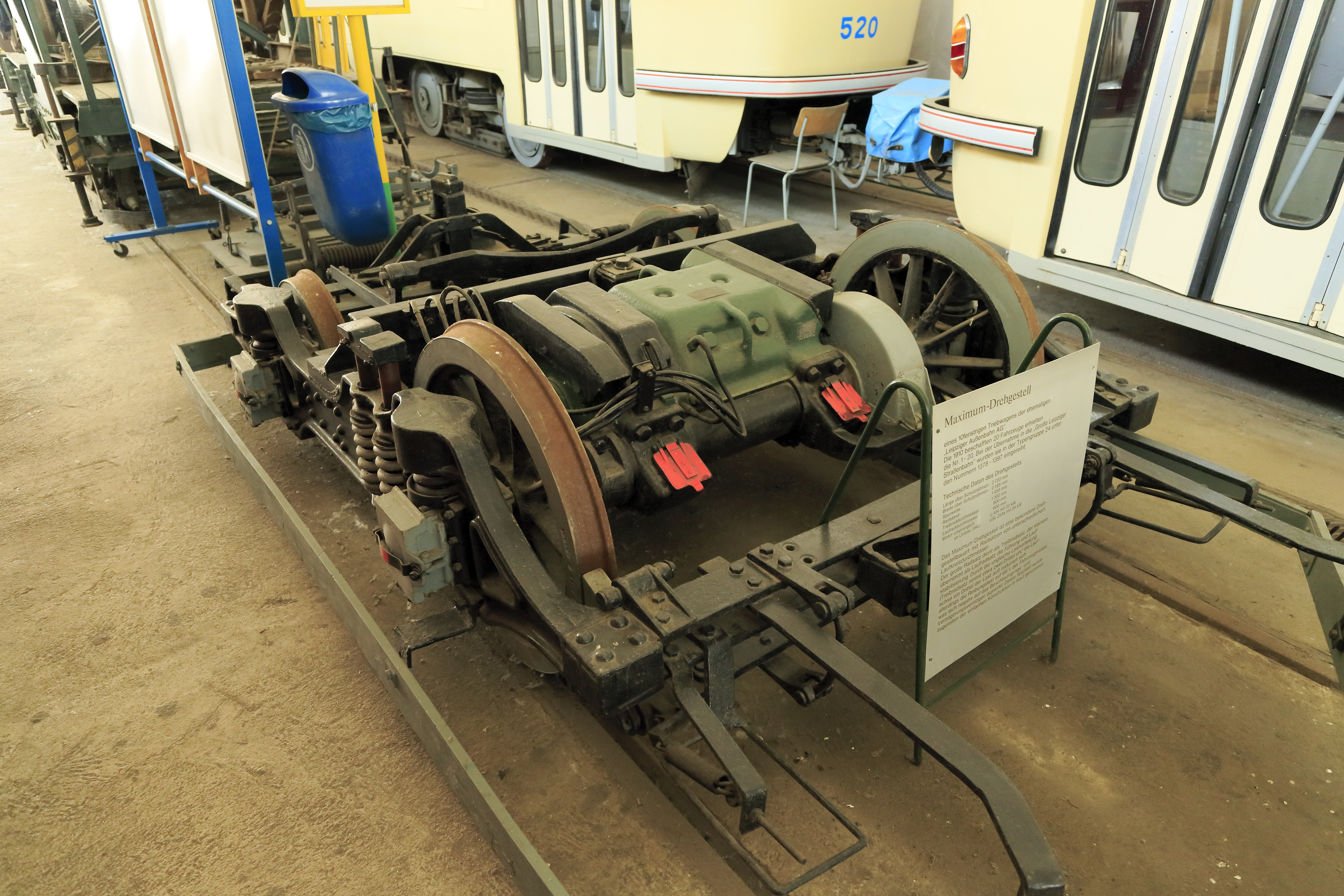 Diese Maximumdrehgestelle wurden in Leipzig nur unter den LAAG-Triebwagen des Typs 20 verwendet, diese wurden 1909 von der Norddeutschen Waggonfabrik Bremen und der Waggonbauanstalt Falkenried geliefert. Die ursprüngliche Motorbauart war U 104 mit nur 22kW, bei den Wagen, die 1942 nicht zu Lenkdreichsern umgebaut wurden, wurden sie 1941 durch USL 235a mit 34kW ersetzt. Für die großen Wagen war auch diese Leistung nicht berauschend.Die roten Deckel sind die Schmierölgefäße der Tatzlager.